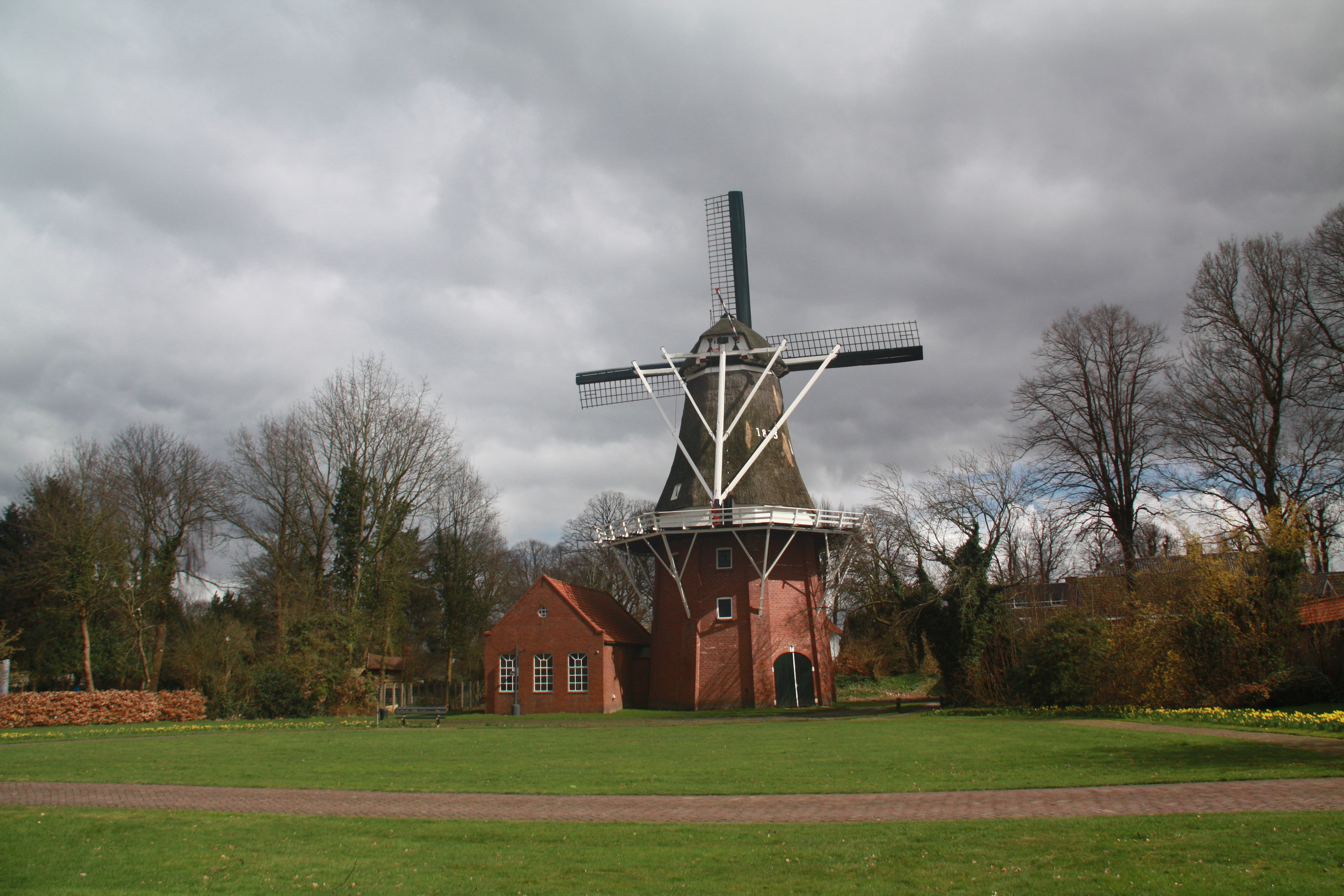 Hazewind (molen)